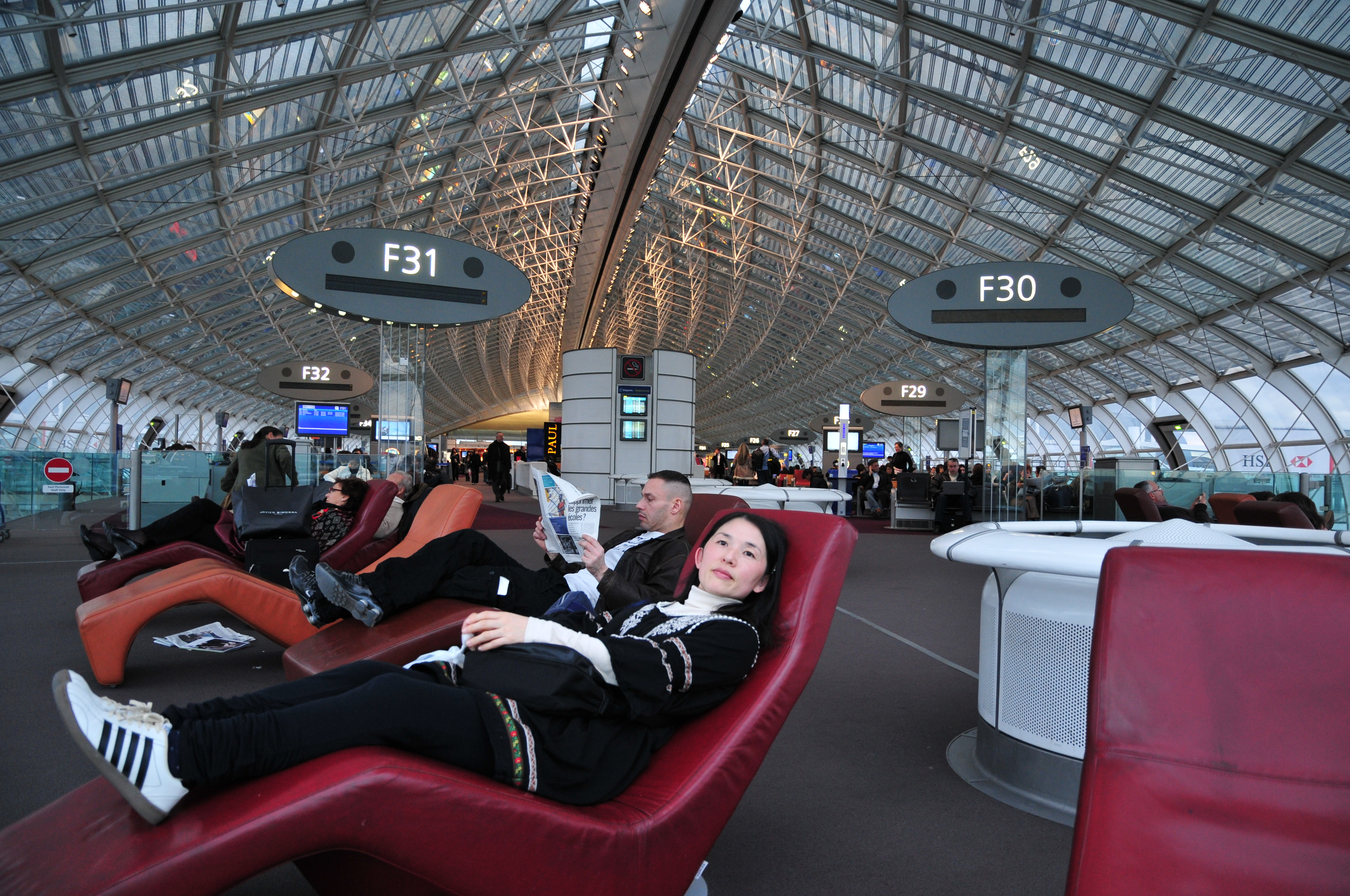 Paris-Charles de Gaulle Airport